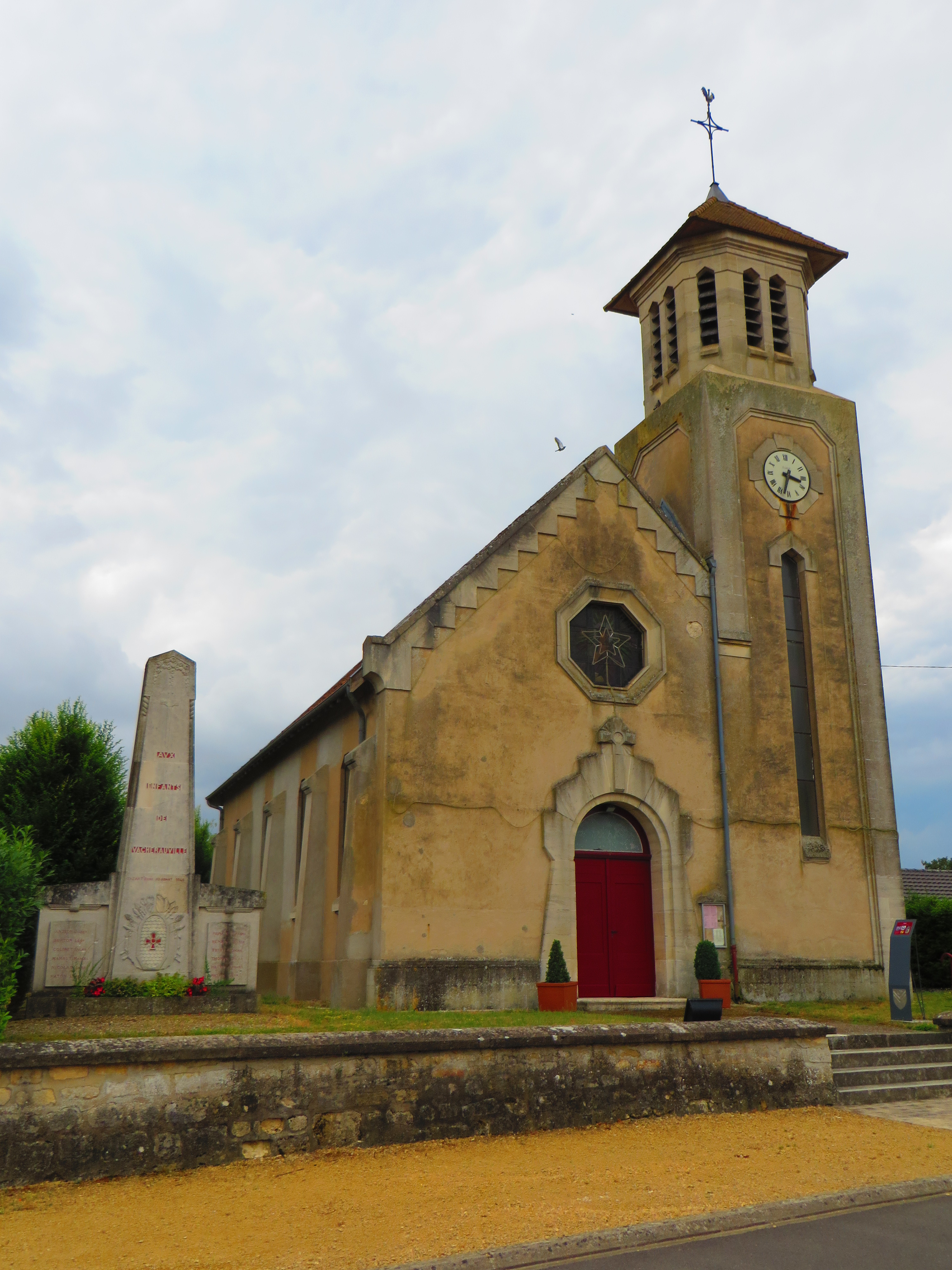 Vacherauville L'église Saint-Martin